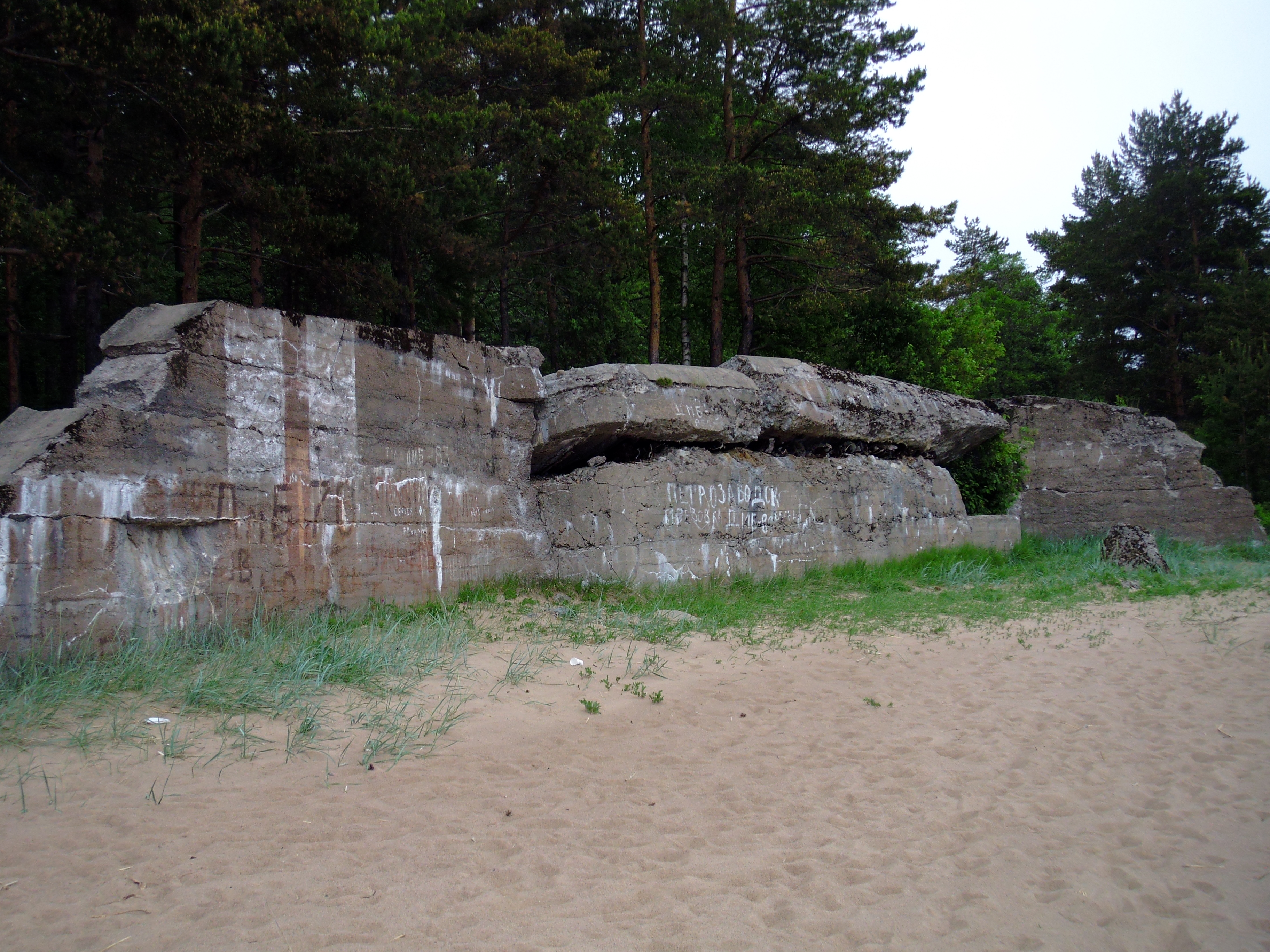 Форт Ино Ленинградская область